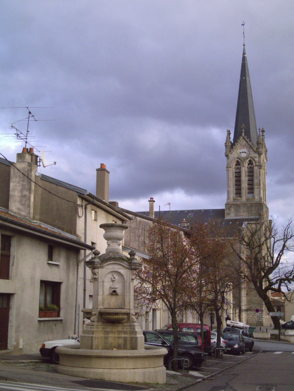 L'église Saint-Genès, et la fontaine de la place de la Liberté à Laxou (54), vue depuis l'angle rue du pressoir-rue Jules Ferry.